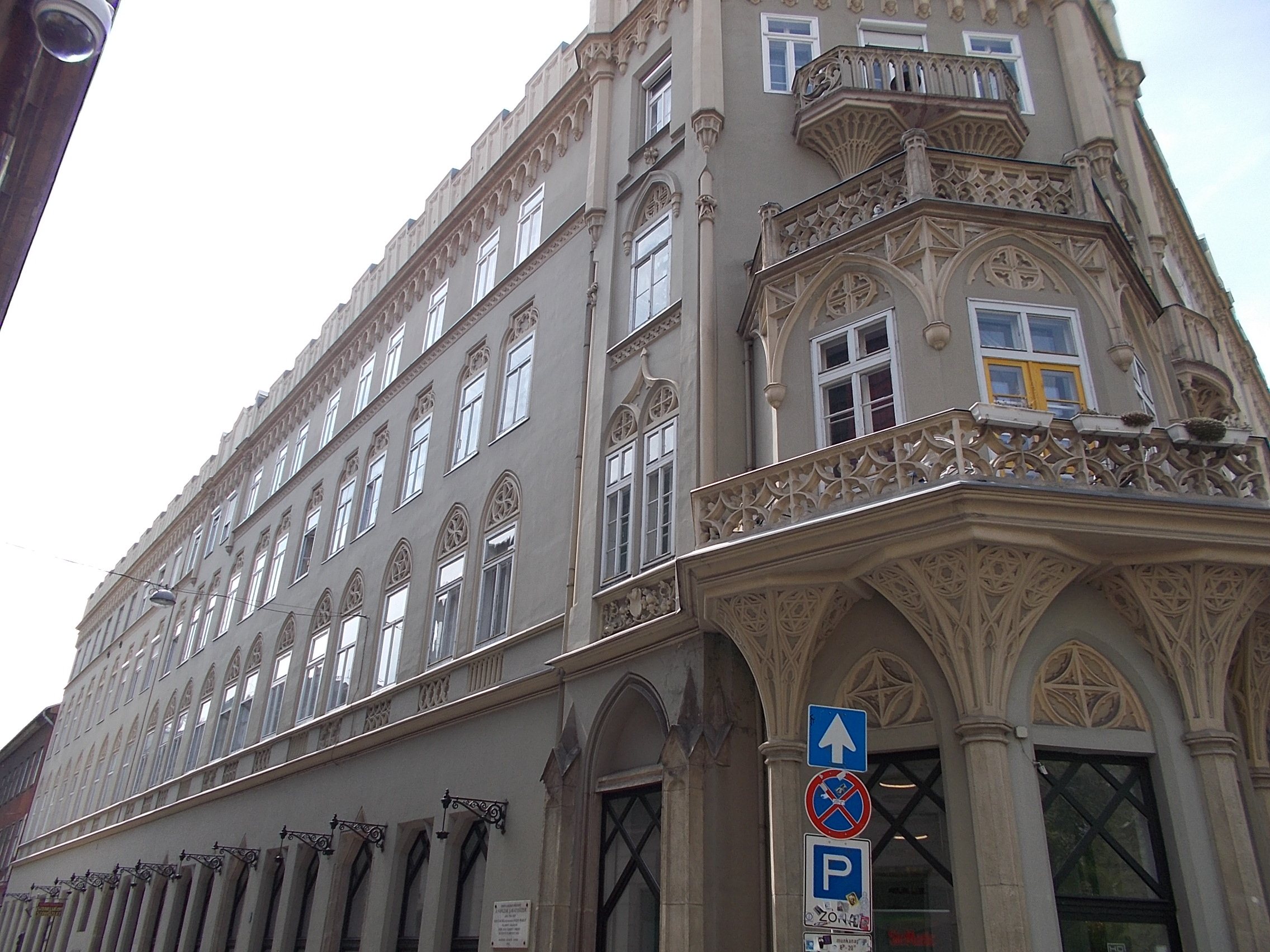 Pekáry-ház. Háromemeletes, Brein Ferenc, 1847-1849. Csányi utcai homlokzat. Műemlék ID 845 - Budapest 7. kerület. Király utca 47 és Csányi László utca 12-14